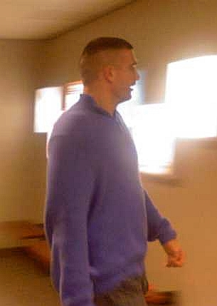 Peter Aerts op PRIDE & HONOR 2006, Ahoy', Rotterdam, NederlandPeter Aerts during PRIDE & HONOR 2006, Ahoy', Rotterdam, Netherlands